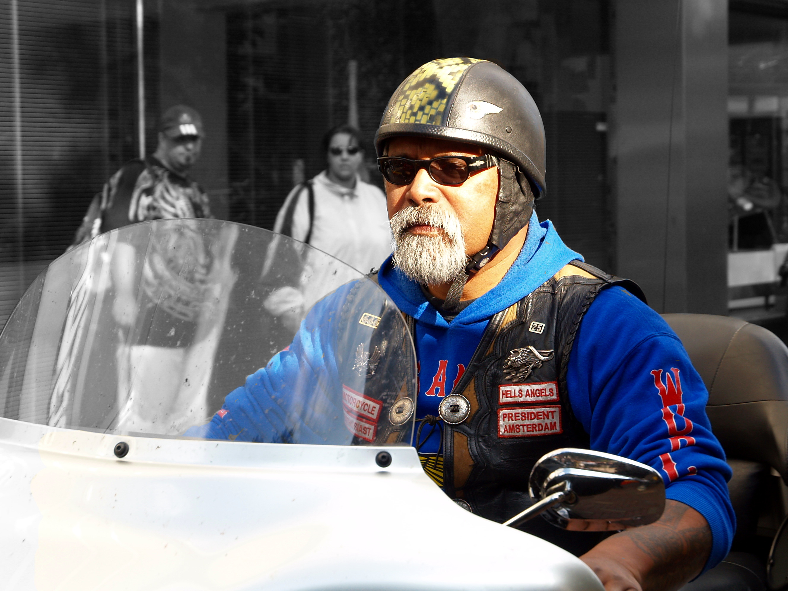 De baas van de Hells Angels uit Amsterdam. De foto is gemaakt in September 2008 op de Confederates dag in Amersfoort